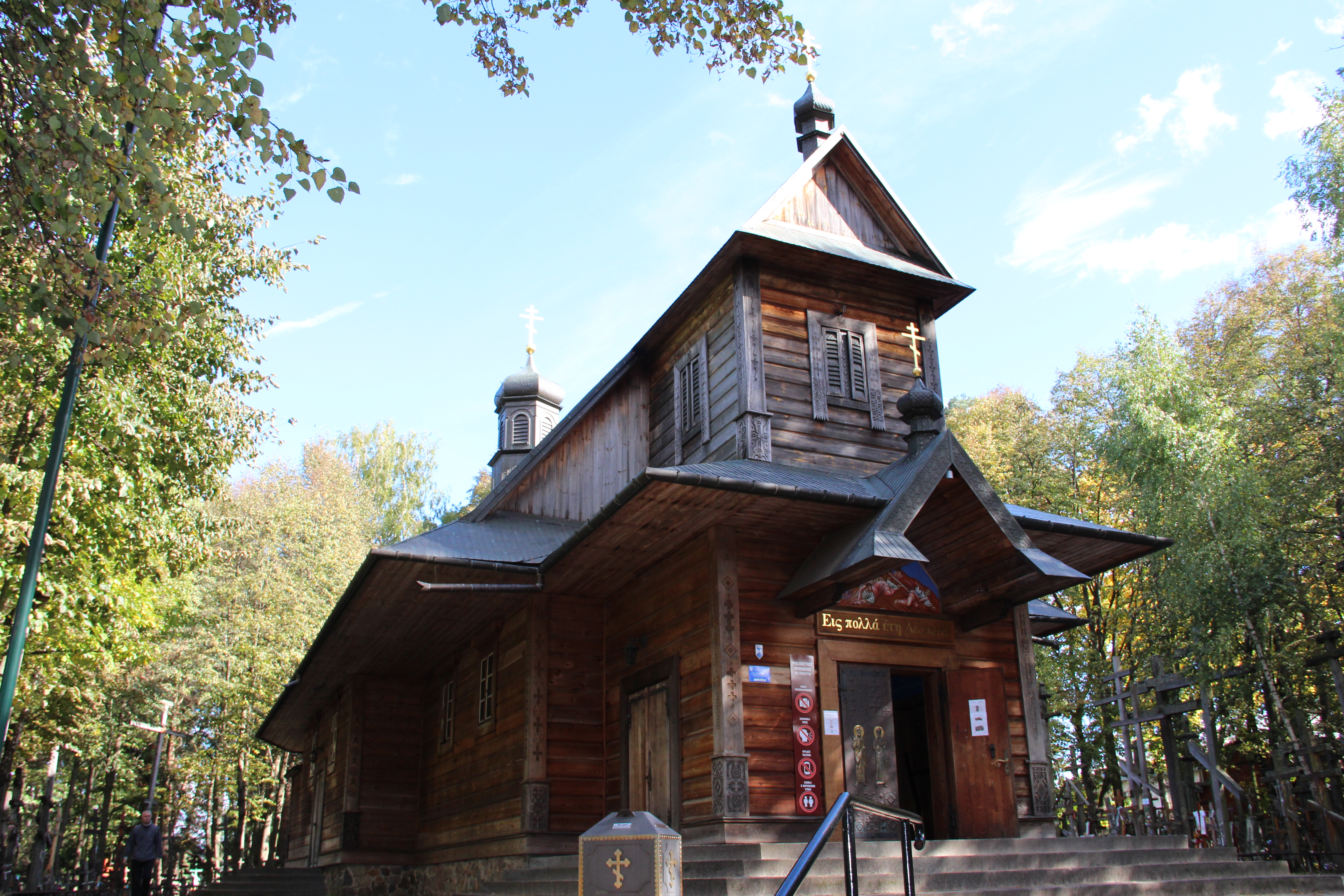 Prawosławne sanktuarium na Górze Grabarka w woj. podlaskim.